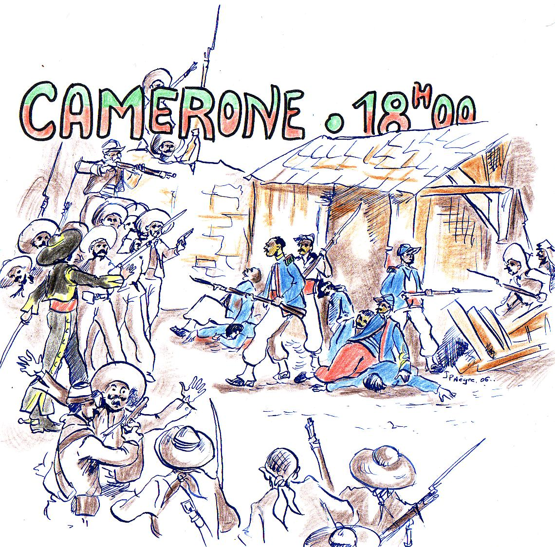 Description Dessin perso d'aprés oeuvre d'eugéne Lelièpvre. User:Jp.negre